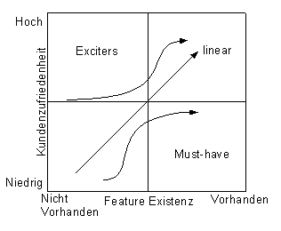 Kano-modell